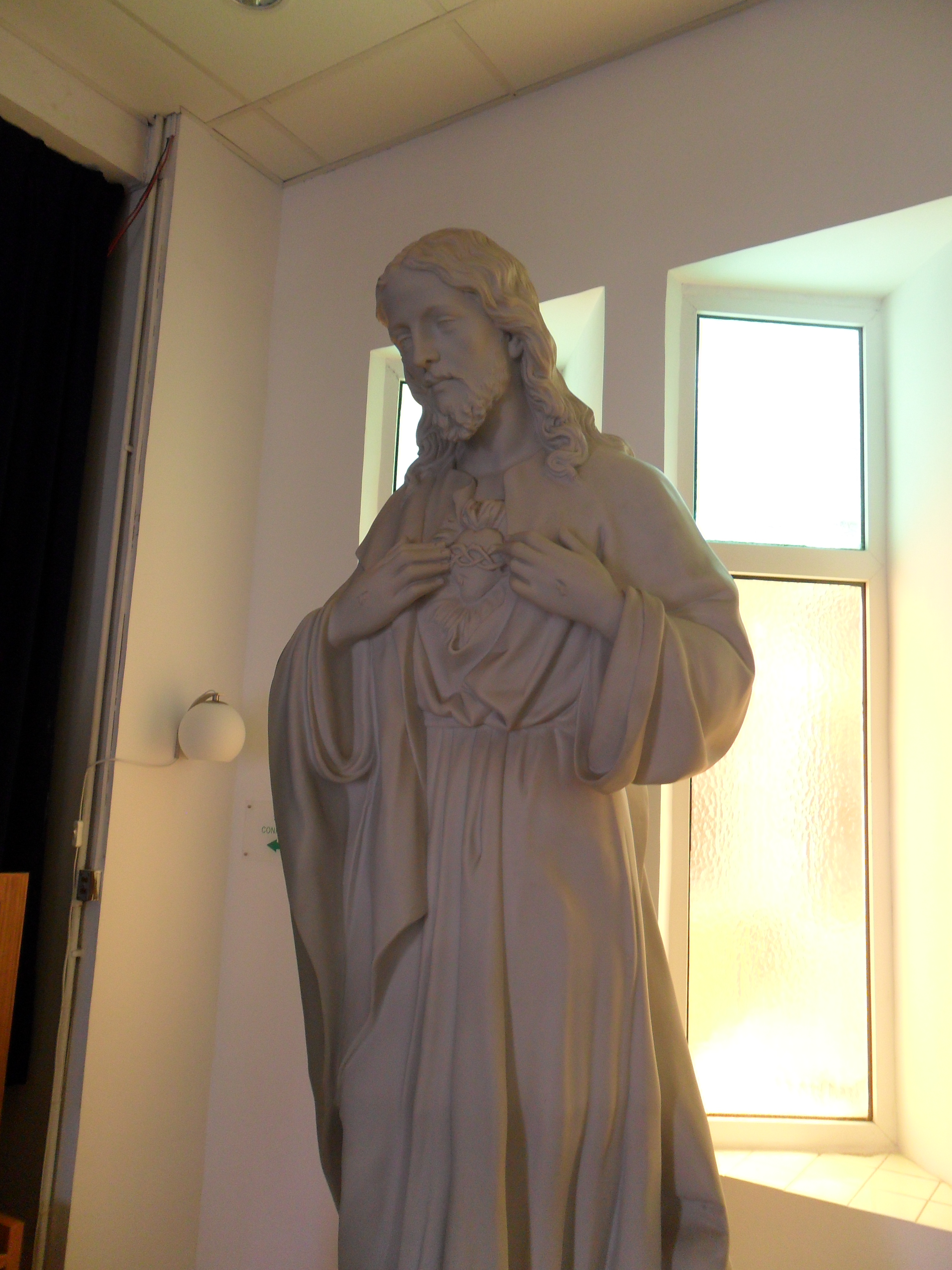 中文（香港）: 長洲花地瑪聖母堂耶穌聖心像, 香港, 中國